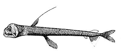 Dana viperfish (Chauliodus danae)